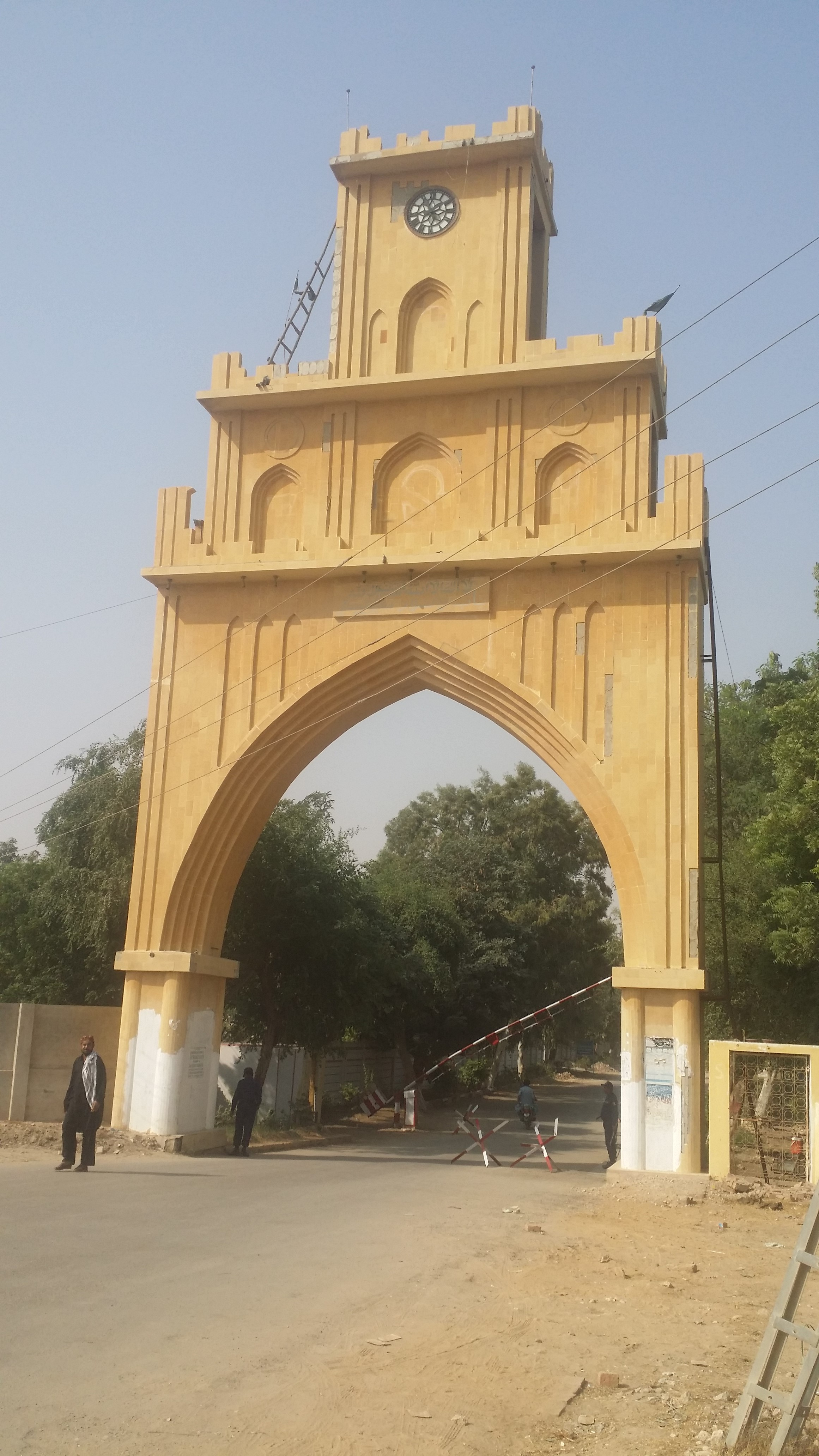 سنڌي: (سنڌ يونيورسٽي دروازو (گيٽ